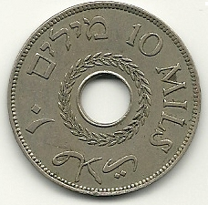 מטבע של 10 מיל הידוע בכינוי "גרוש"